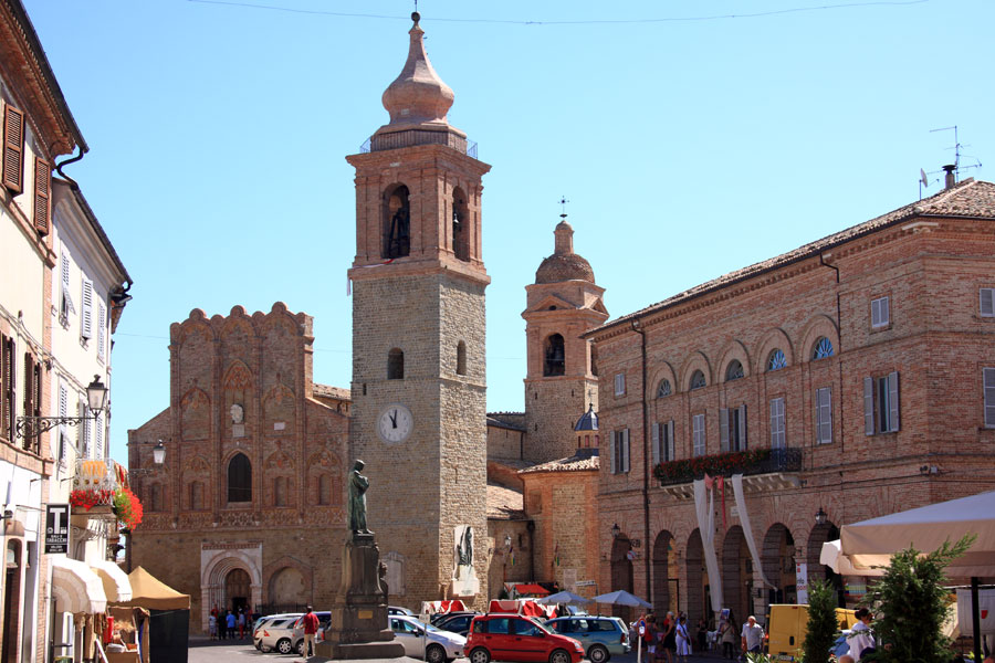 Veduta di piazza Alberico Gentili a San Ginesio (MC) con la Collegiata della SS. Annunziata ed il Teatro.